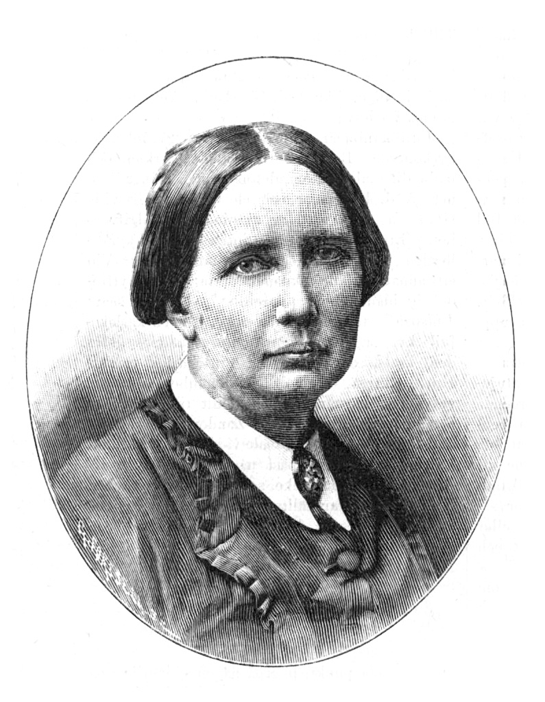 Hilma Zander (1826-1894)